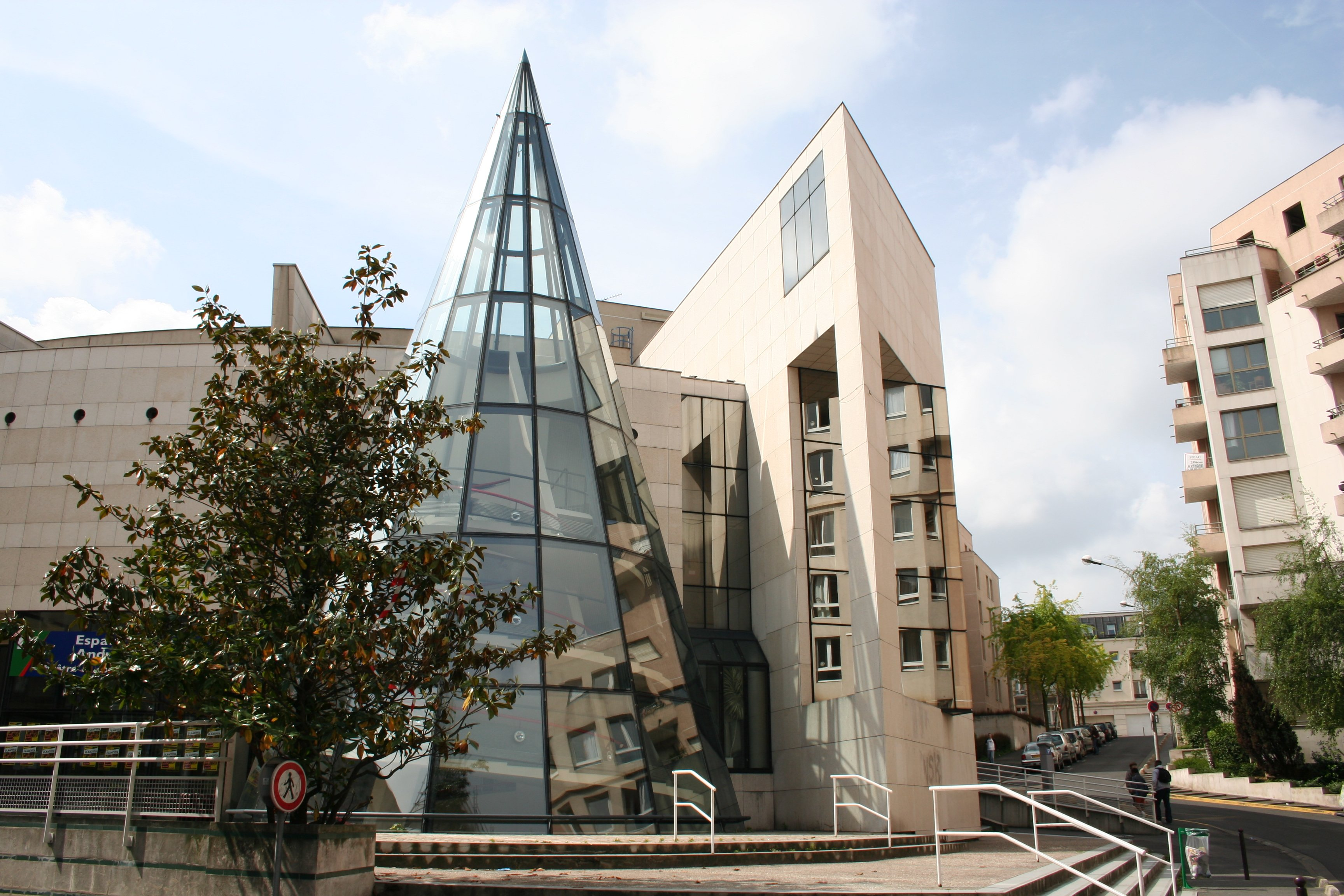 Conservatoire du Kremlin-Bicêtre (94), France